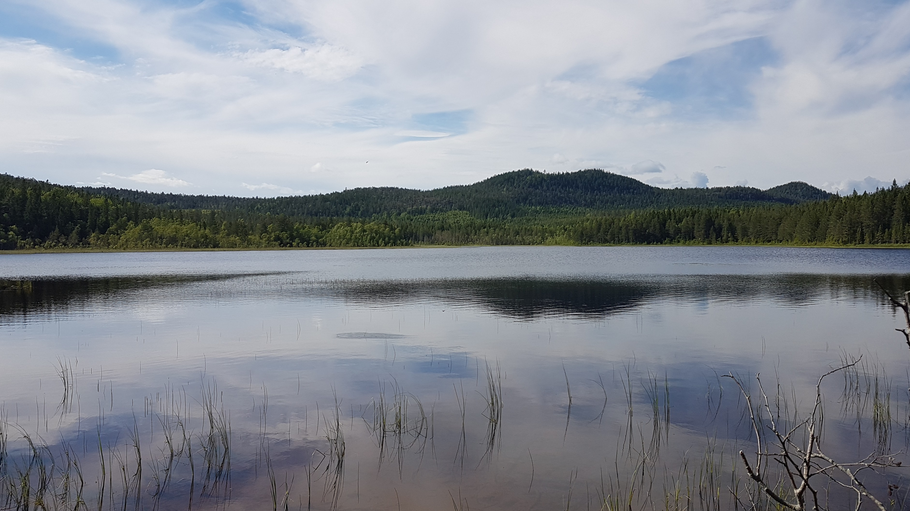 Dalsjön sedd från öster.